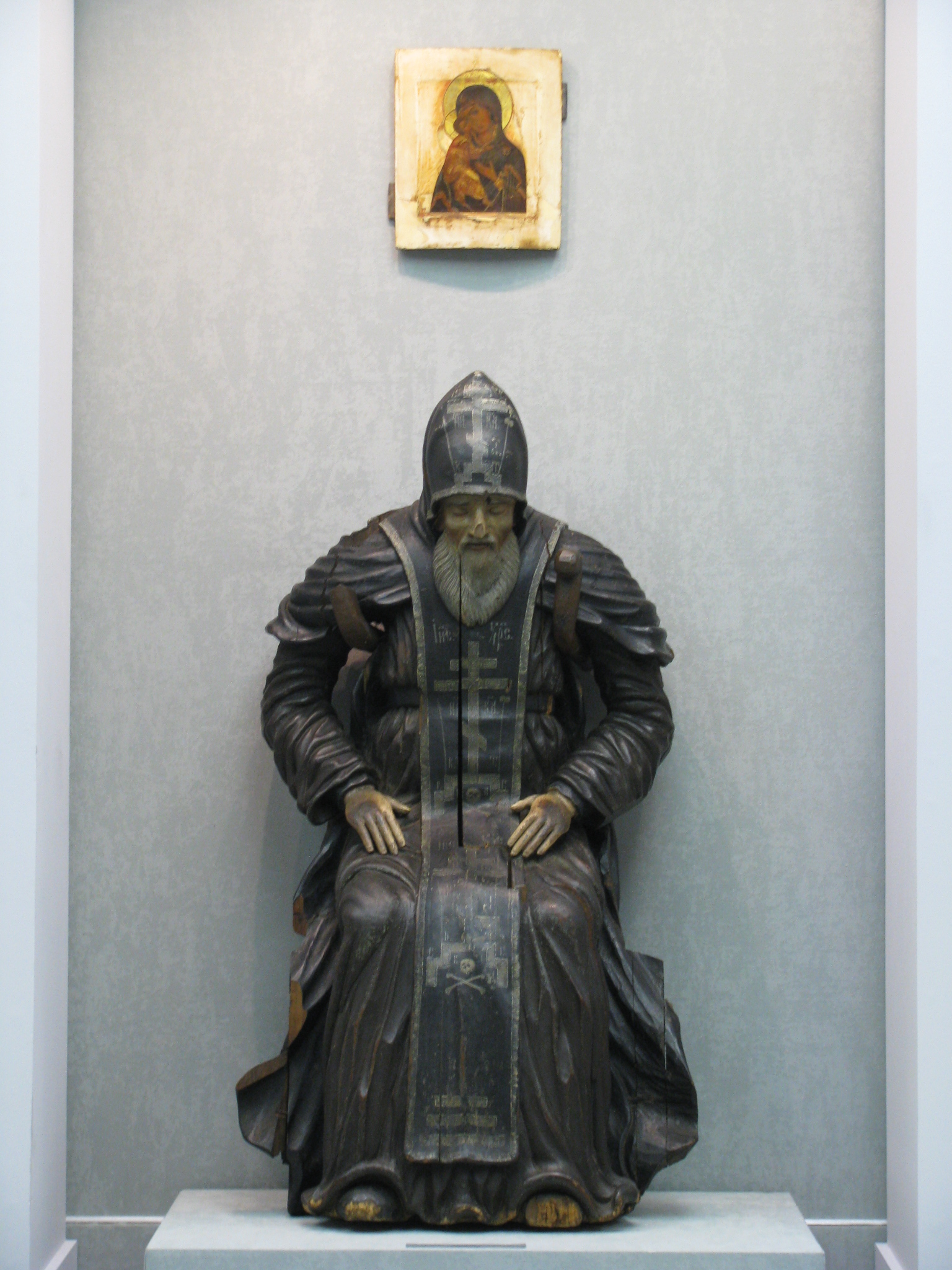 Деревянная скульптура преподобного Нила Столобенского, почитается чудотворной, 18 век, анонимный автор